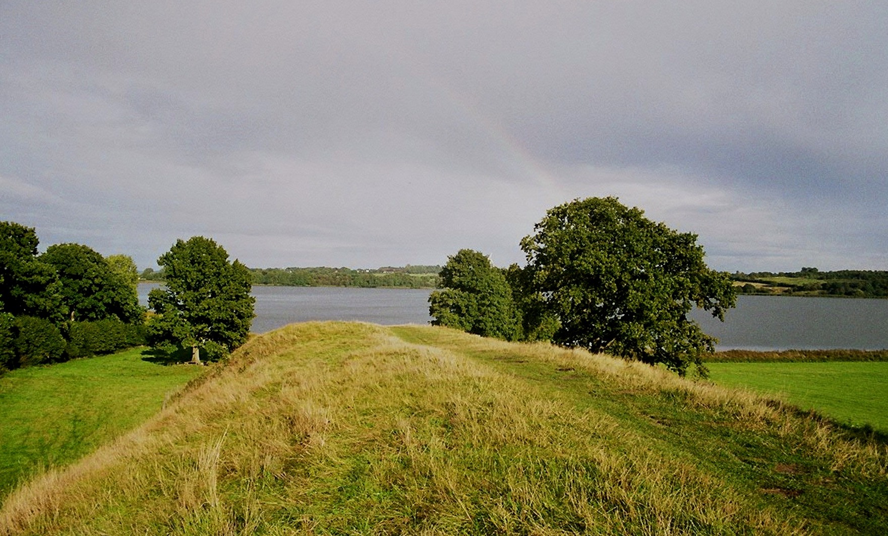 Source: made by WikiTour 2005 Description: (de:) Haithabu - Blick vom begehbaren Halbkreiswall in Richtung Haddebyer Noor